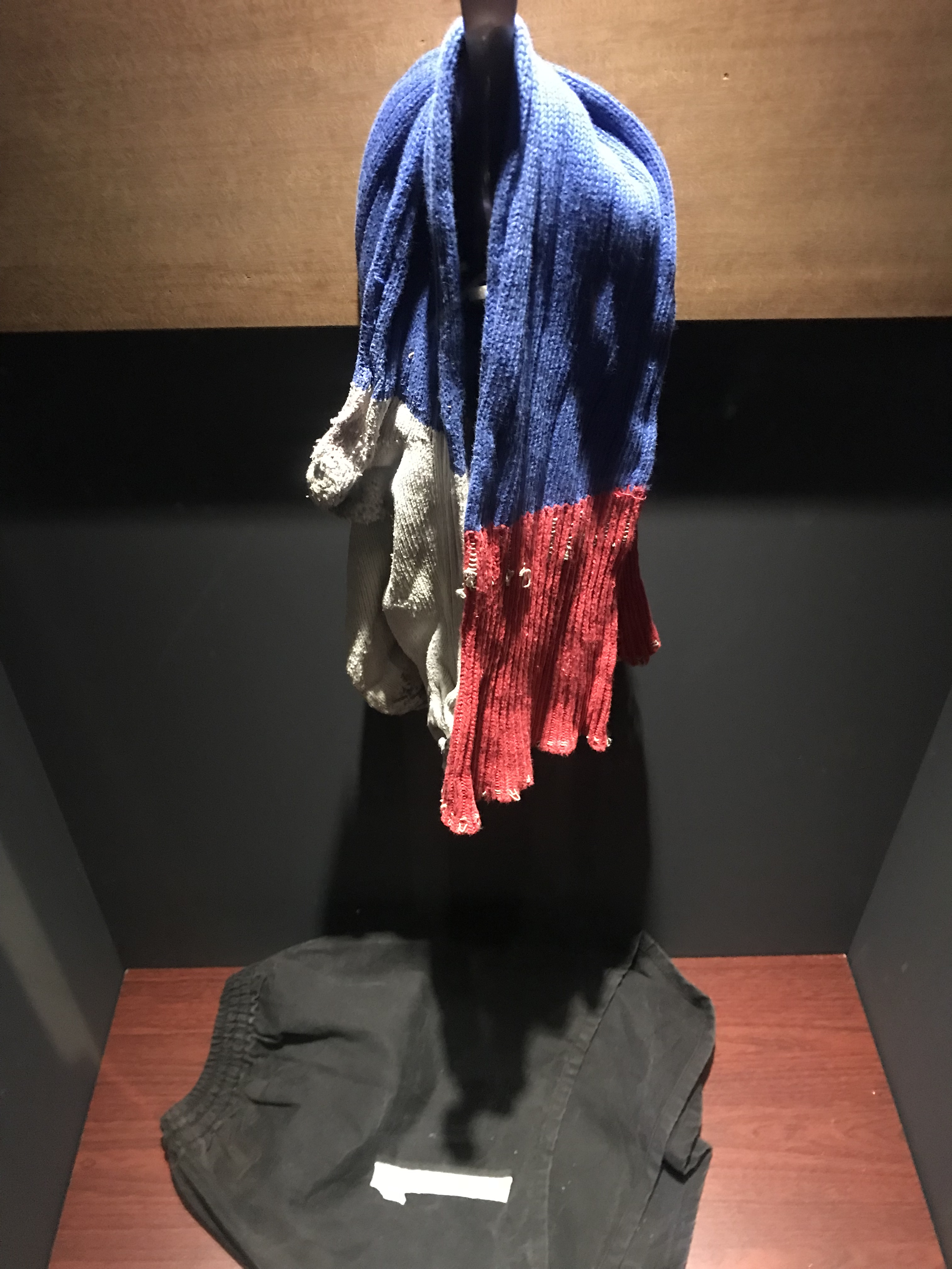 OL Le Musée au Parc OL.